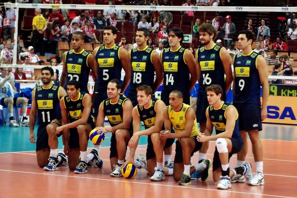 Zdjęcie zrobione podczas zawodów Ligi Światowej 2012 w katowickim Spodku.